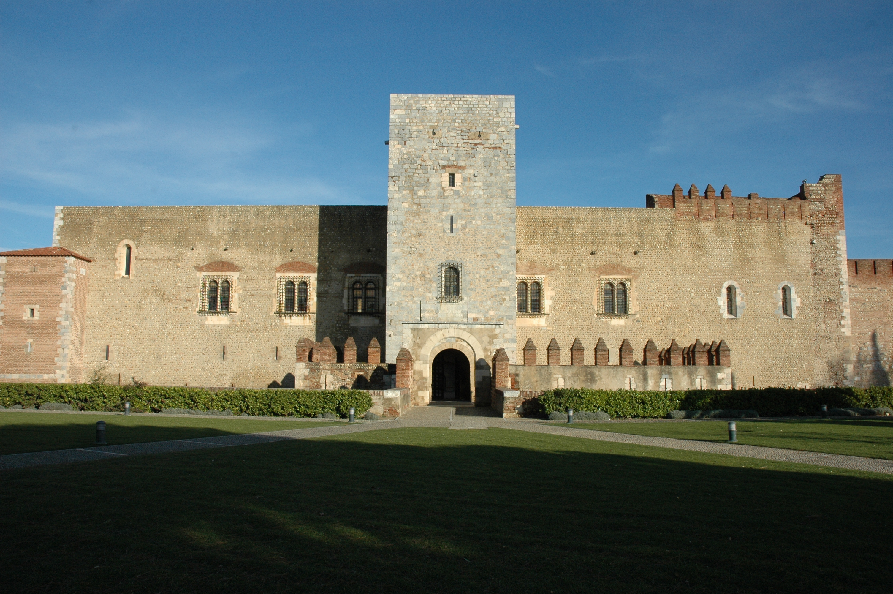 Perpinyà - Palau dels Reis de Mallorca - Façana de ponent